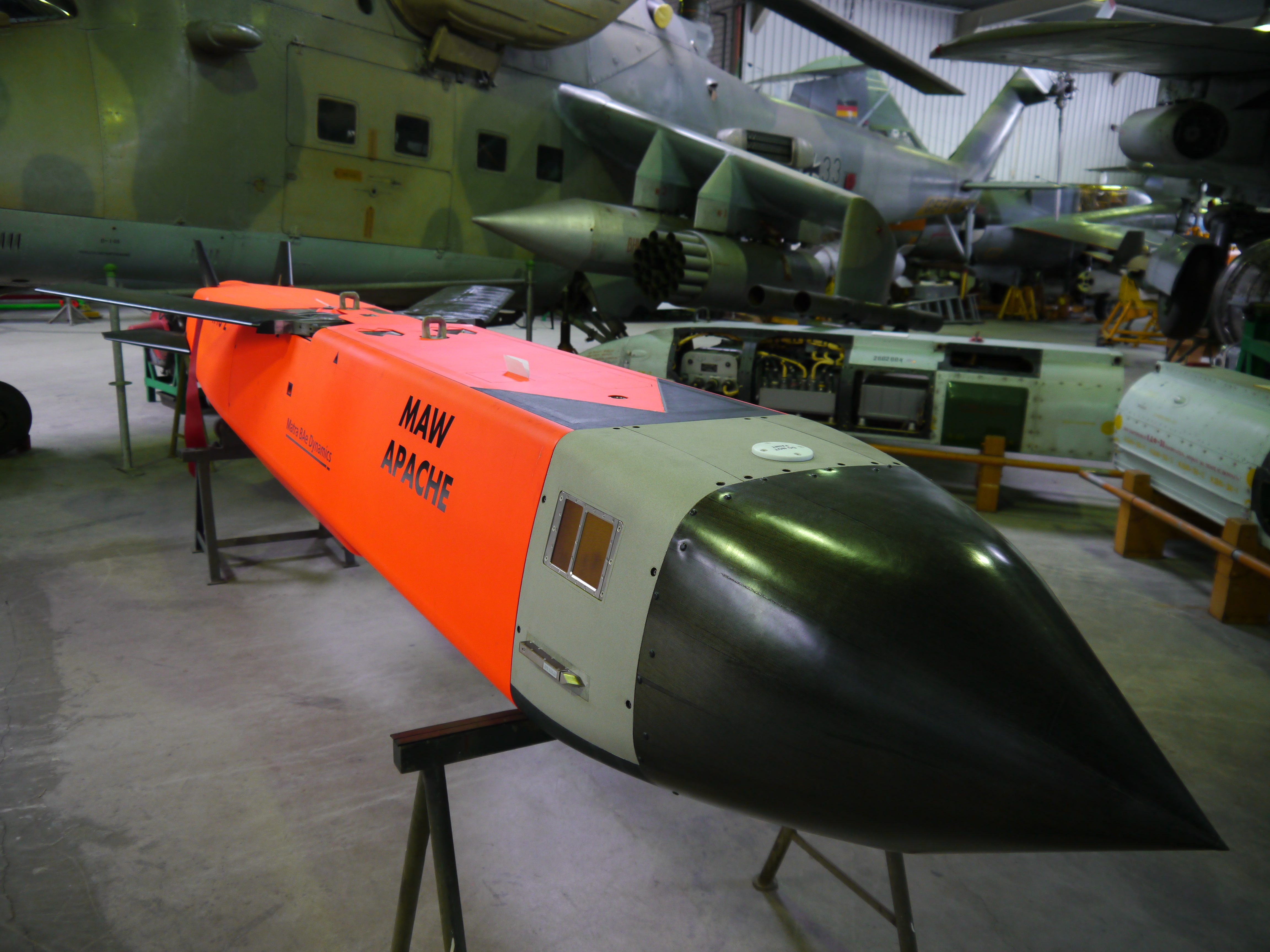 Wehrtechnische Studiensammlung Koblenz 42